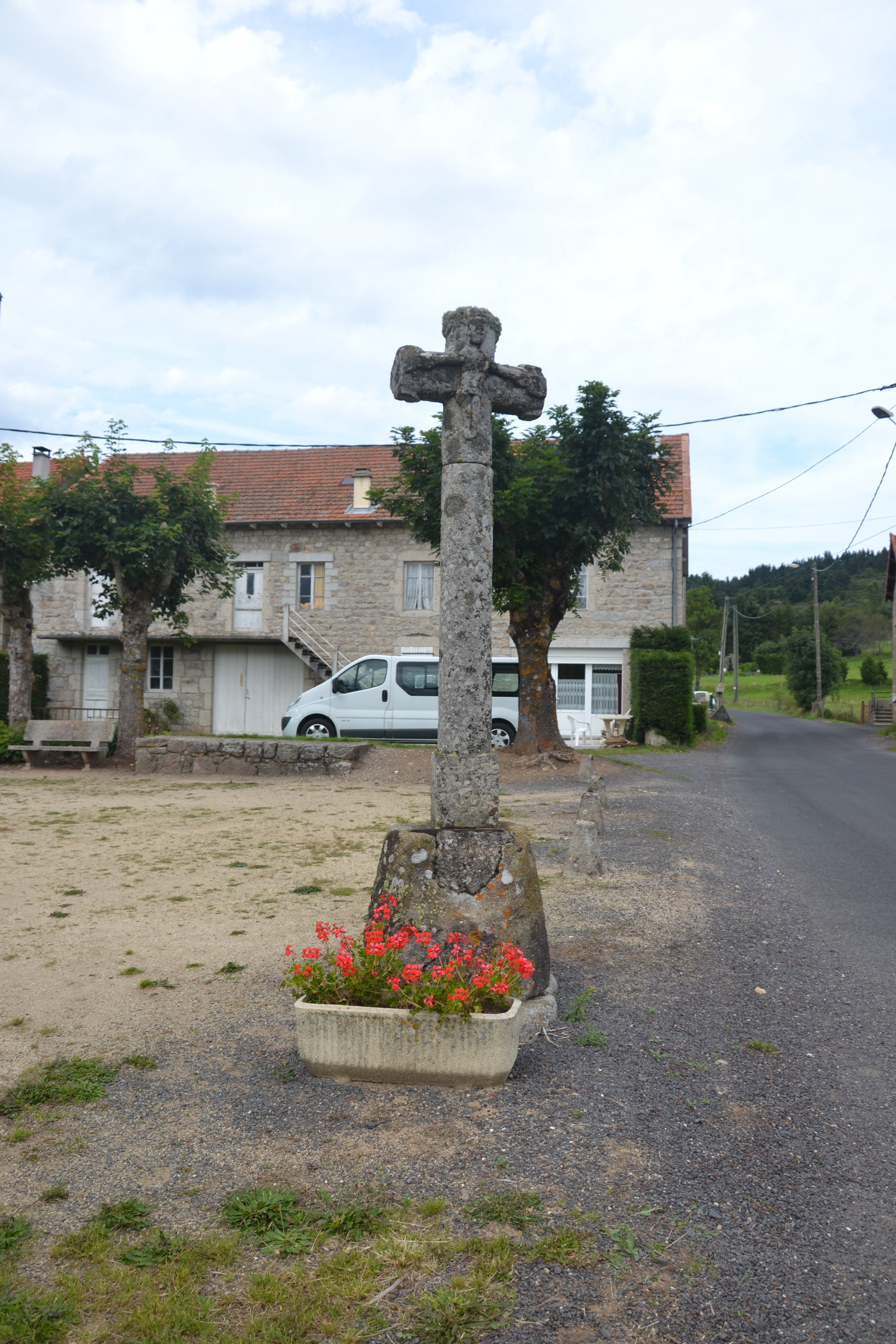 Croix à Issarlès